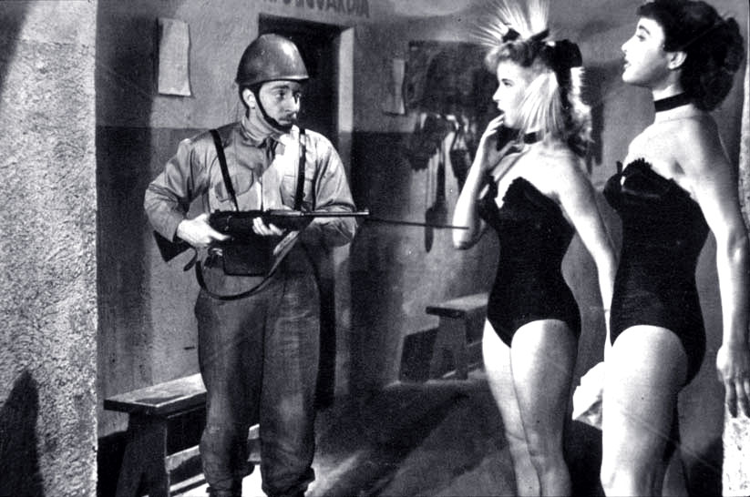 Carlo Croccolo, Delia Scala e Silvana Pampanini in una scena del film "Bellezze in bicicletta" (Campogalliani, 1951